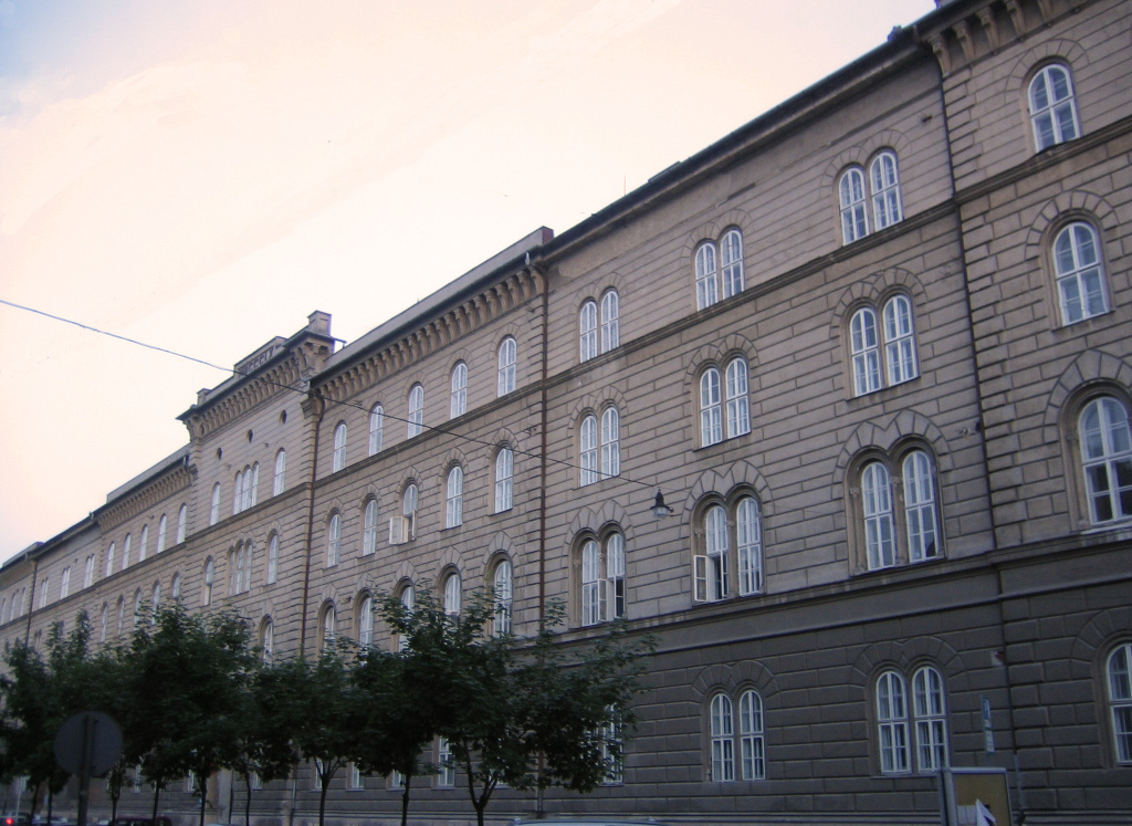 Palatul Dicasterial (Timişoara)